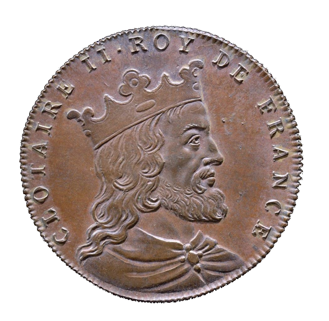 Jean Dassier (1676-1763) - Clotaire II roy de France (584-629). Buste du roi à droite ceint d'une couronne.